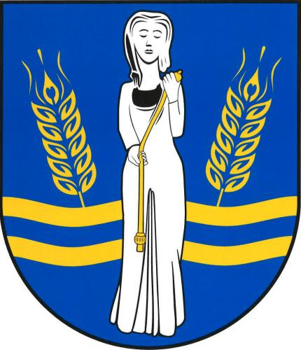 znak, Mokošín, okres Pardubice